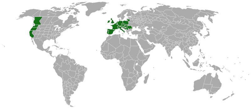 Psilocybe cyanescens range map.